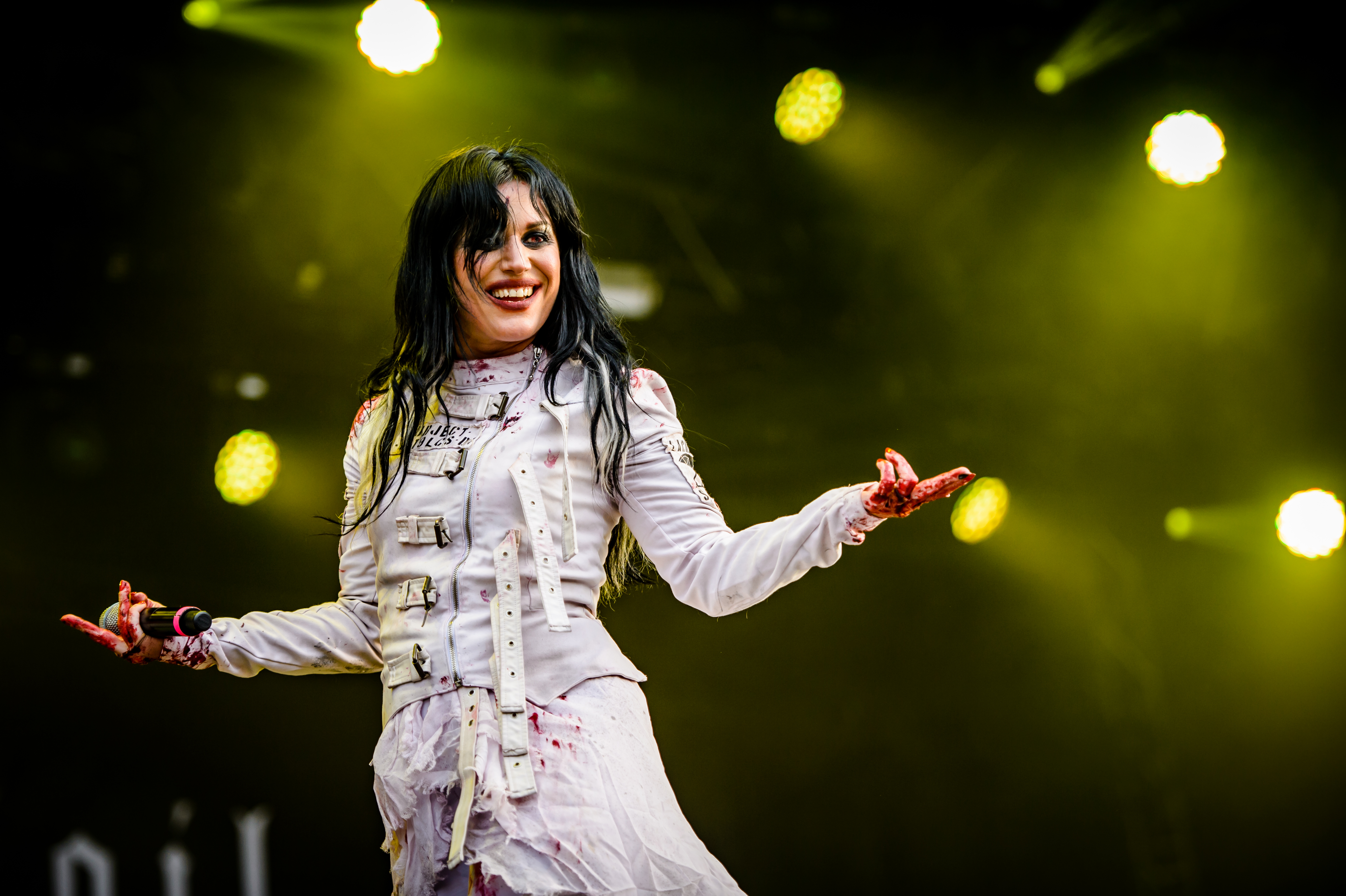 'RockHarz Open Air 2017; Ballenstedt': 'Lacuna Coil'